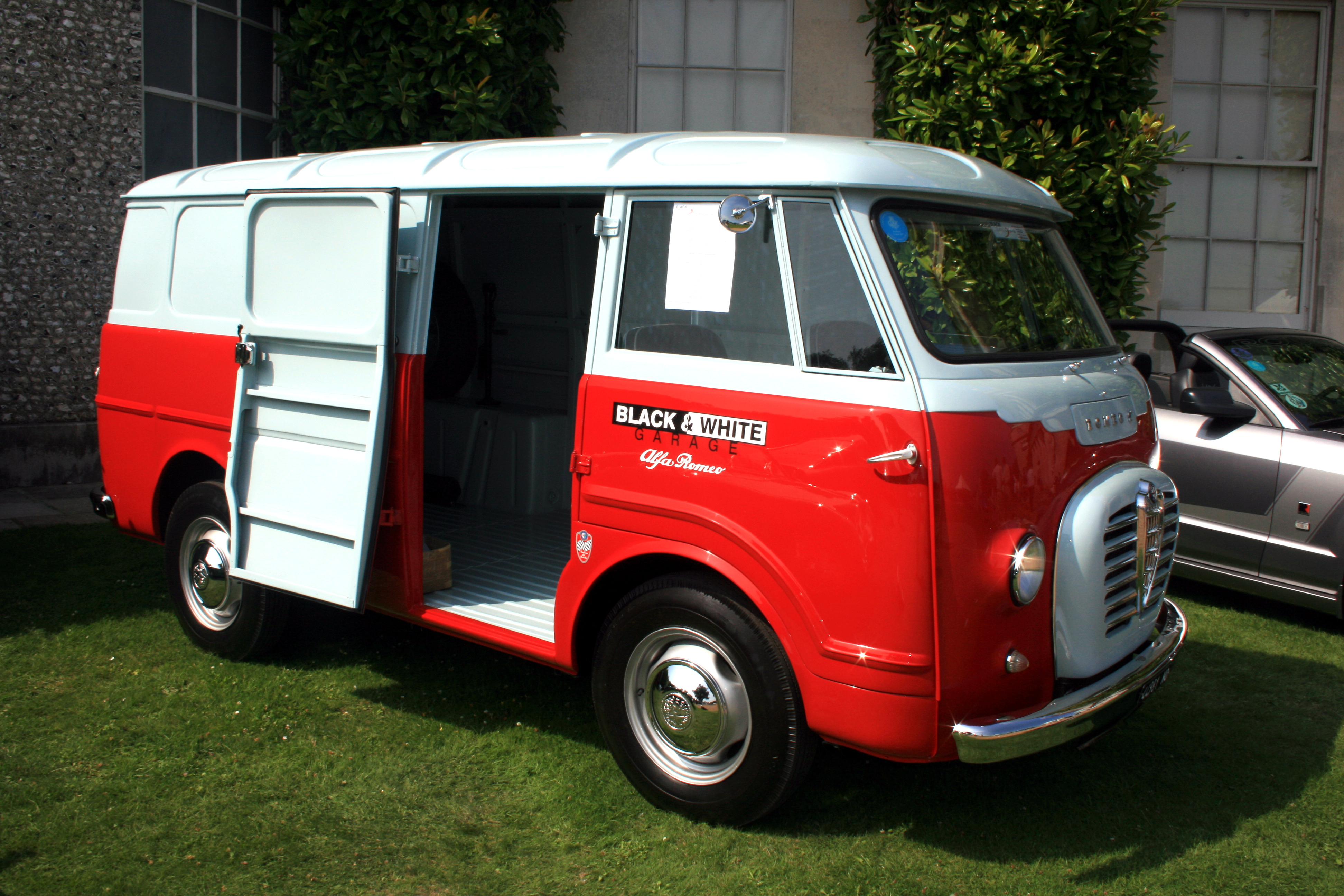 Alfa Romeo 2